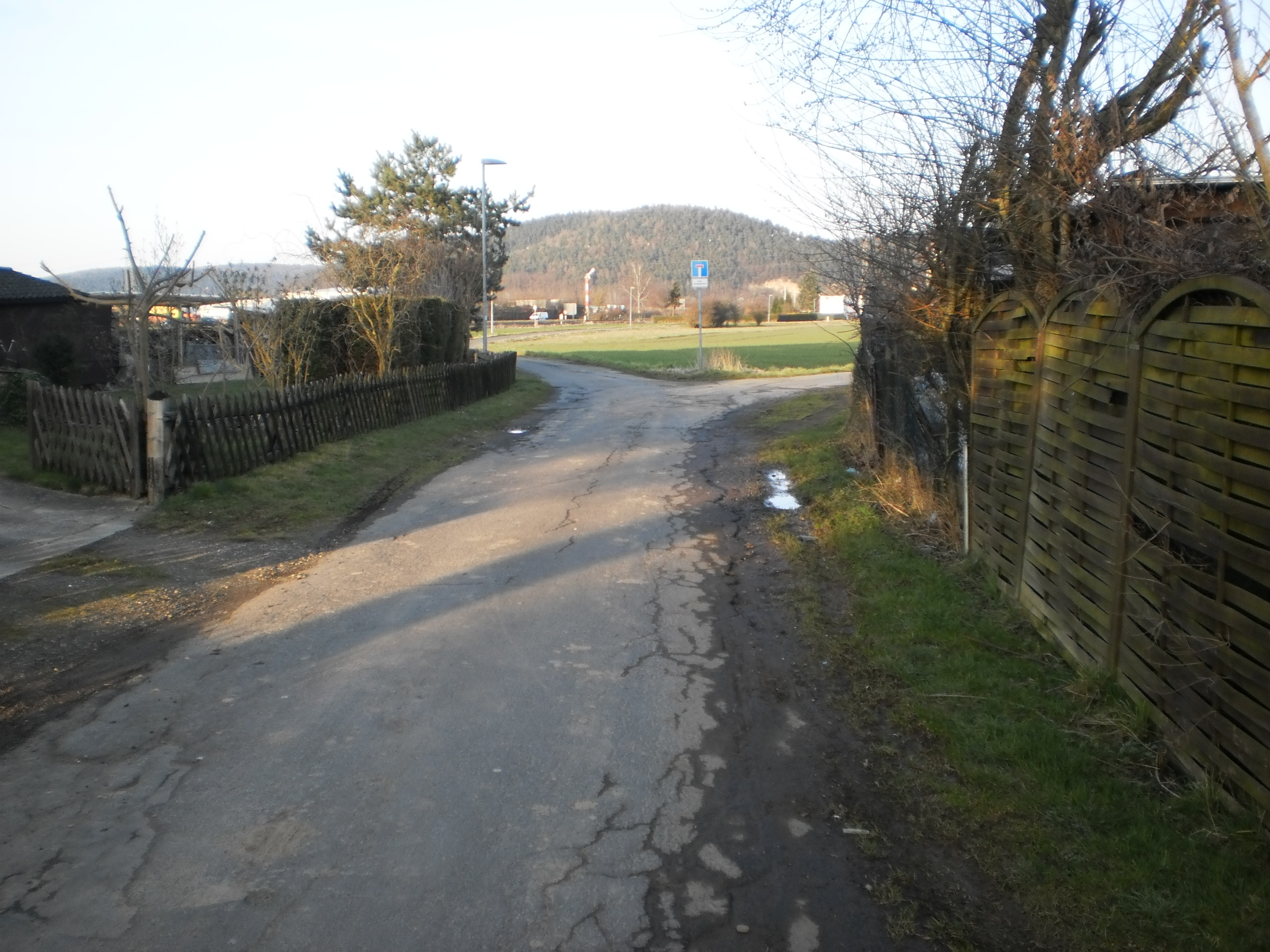 Lahntalradweg in Sarnau-Lahntal in Richtung Cölbe. Der Lahn-Eder-Radweg zweigt an der Kreuzung vorher auf der Kreisstrasse 81 nach Norden ab. Regelmässige Pendler nach Marburg kennen an dieser Stelle vermutlich den Weg, doch Touristen im Burgwald werden hier wegen der verdeckten Abzweigung zum Lahntalradweg (rechts mit mouseover sichtbar) Schwierigkeiten bei der Orientierung haben. Auch Radler*innen die im Frühjahr das Fahrrad neu entdecken. Weiter hinten ist der alte Bahnhof Sarnau an der Oberen Lahntalbahn am Ende des Feldwegs mit Sackgassenbeschilderung gelegen (März 2016) Es wäre eine Überlegung, ob dieser bedeutsame Abschnitt als Fahrradstrasse schon an der K81-Kreuzung beschildert werden könnte, dann muss auch kein einziger Baum fallen.